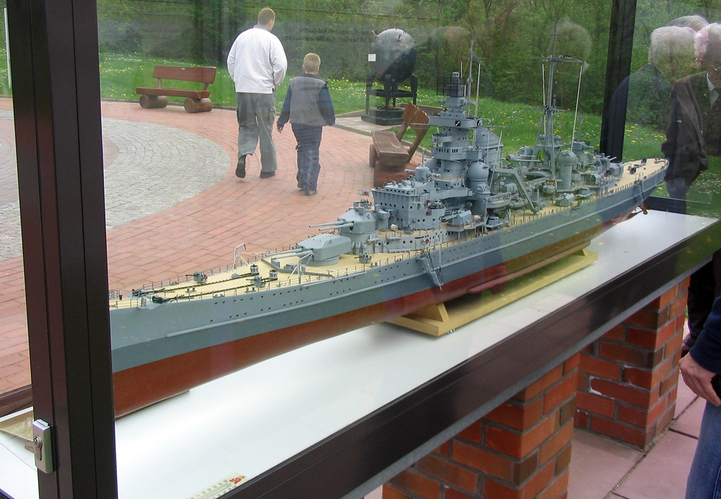 Beschreibung: Prinz Eugen Modell Fotograf: Darkone, 1. Mai 2004